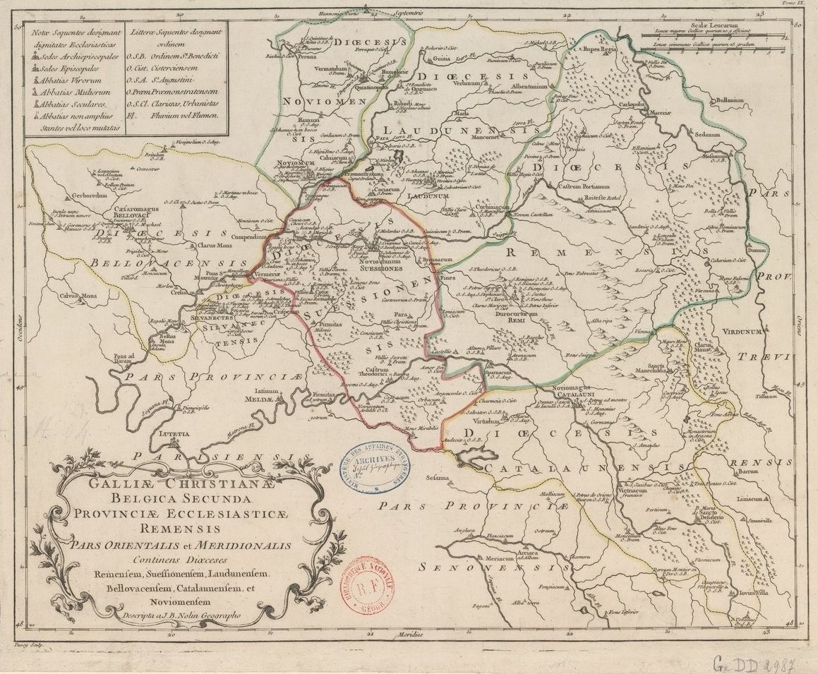 Carte de l'ancienne province ecclésiastique de Reims sud-est, insérée dans la Gallia Christiana (1715/1759).